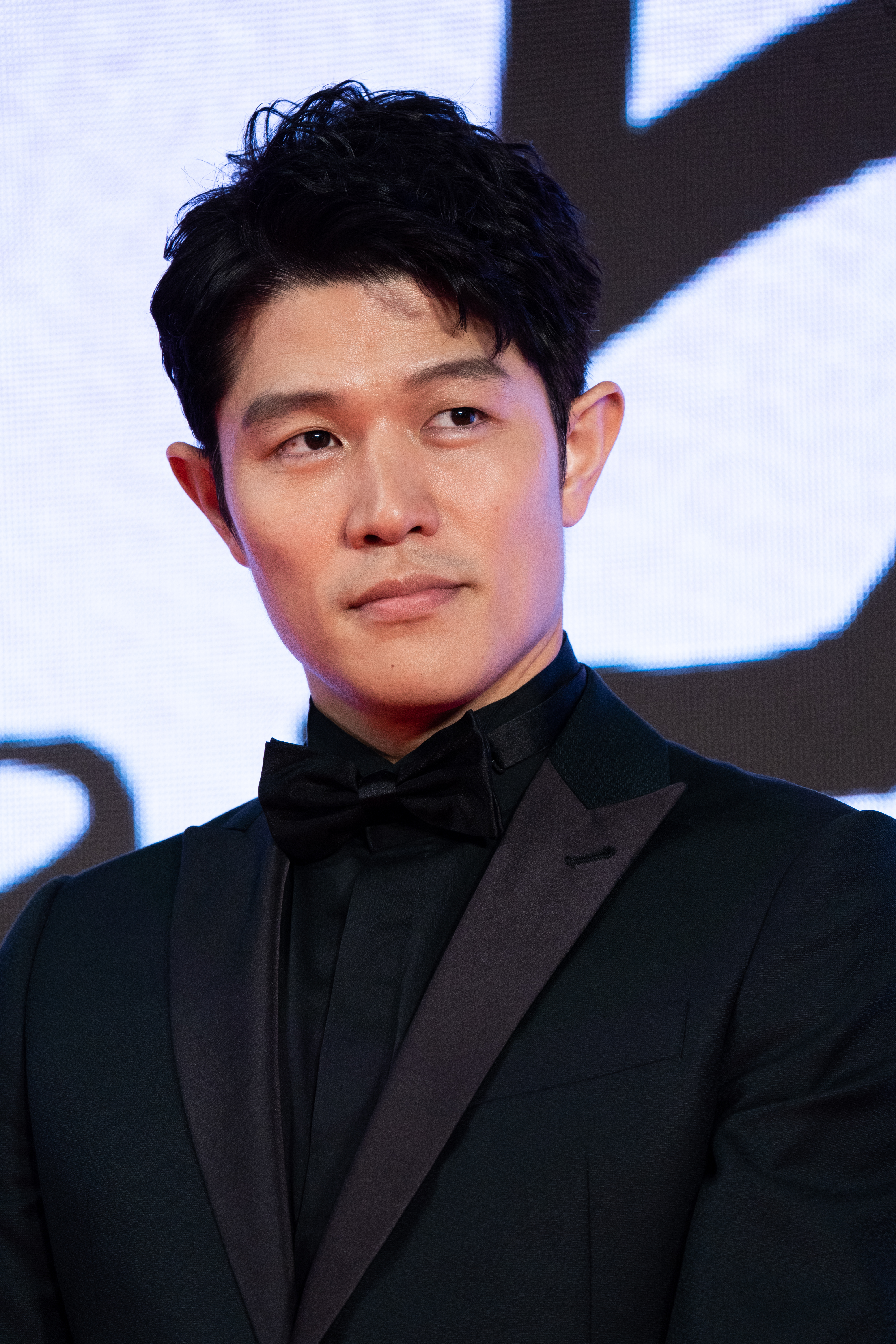 第32回 東京国際映画祭 オープニングセレモニー 鈴木亮平 (ひとよ)